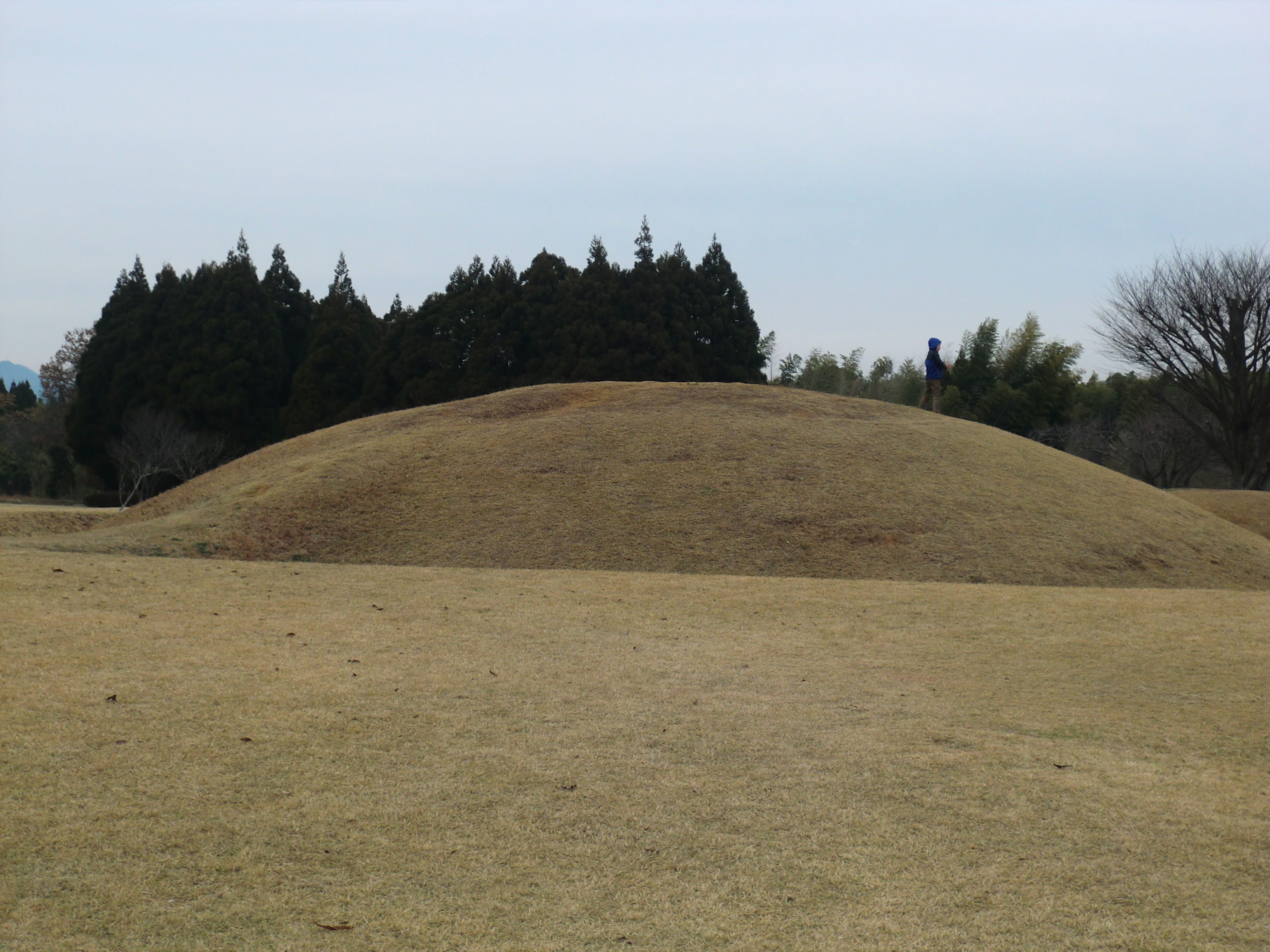 熊本市南区にある塚原（つかわら）古墳公園